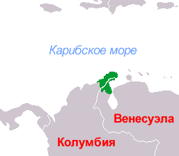 Карта языка и народа гуахиро. Сделана на основе карты из ан-Вики.